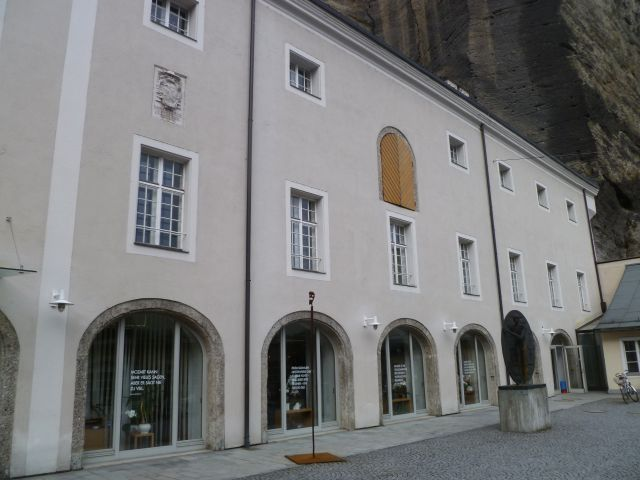 Schüttkasten am Neutor, der Vorplatz archäologisches Fundhoffnungsgebiet